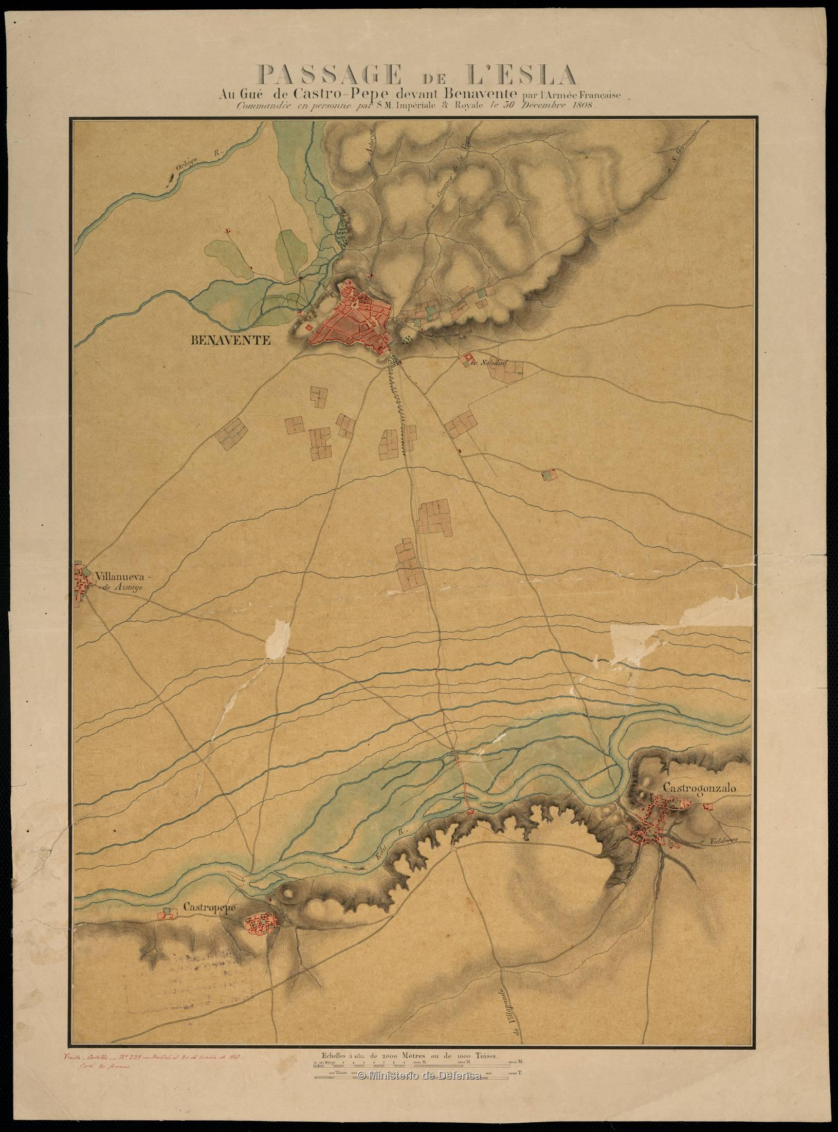 Passage de L'Esla : Au Gué de Castro-Pepe devant Benavente (1847)